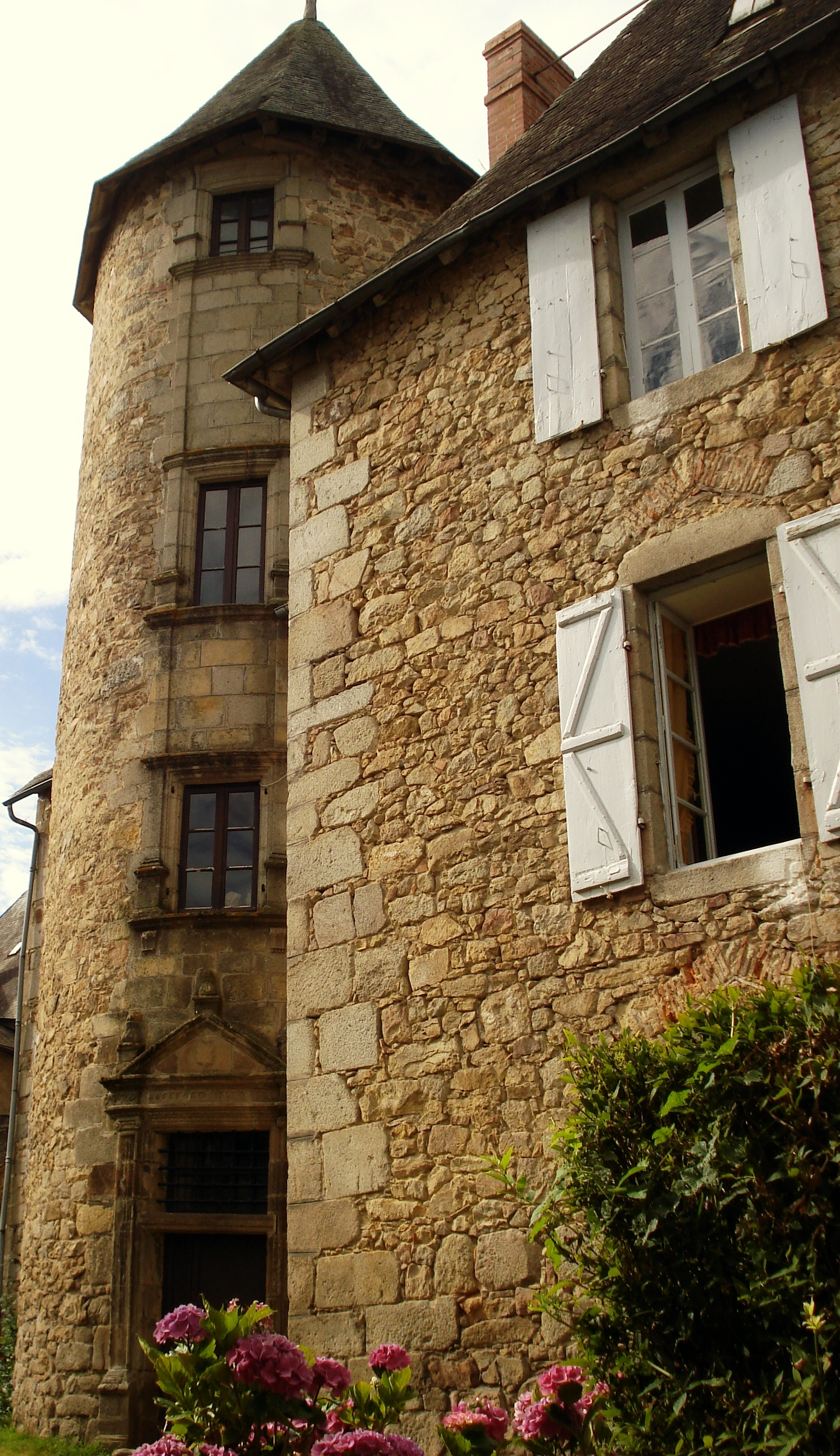 Neuvic en Corrèze : la Tour Saint Mexant